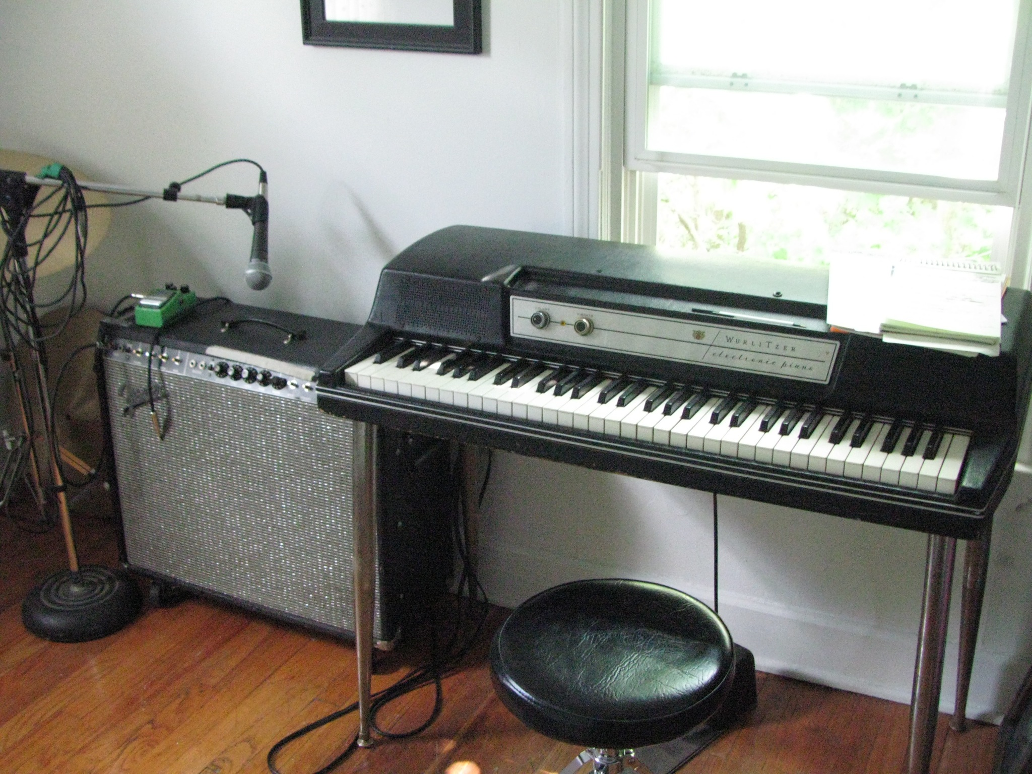 Lil's wurlitzer